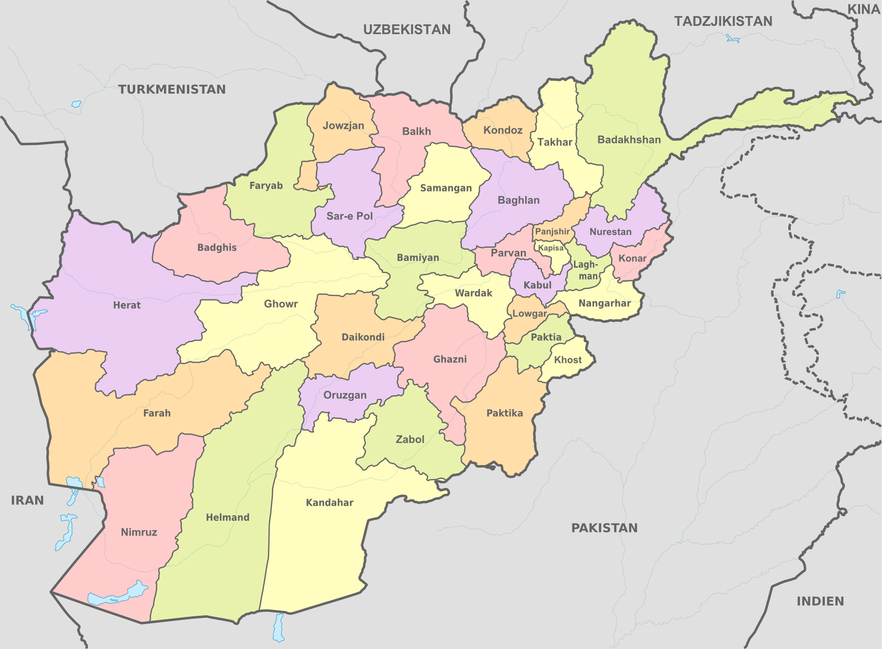 Färglagd karta över Afghanistans provinser med svensk text.